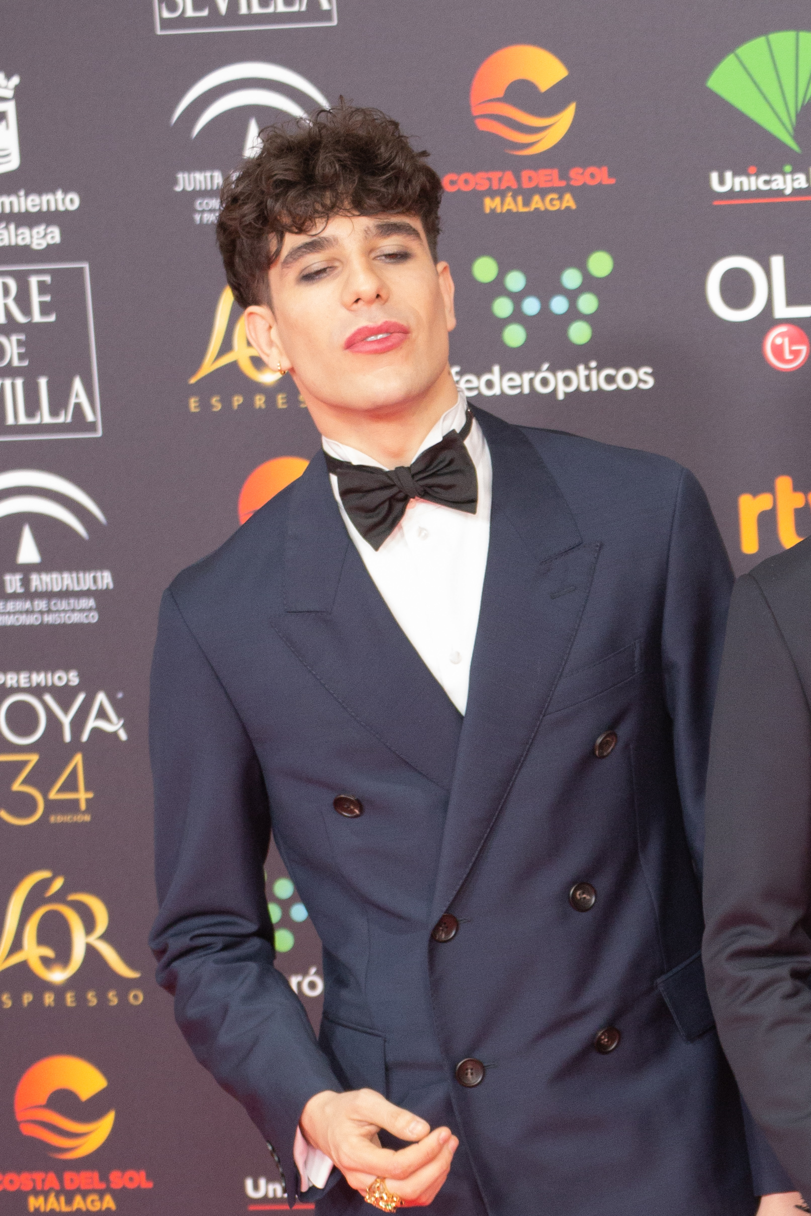 Javier Calvo en la alfombra roja de la ceremonia de entrega de los Premios Goya 2020, celebrados en Málaga